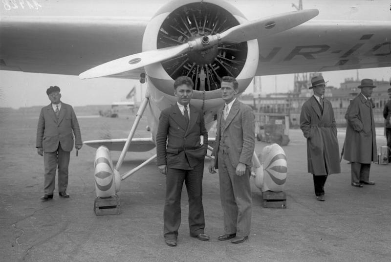 Der Weltflug der beiden amerikanischen Ozeanflieger Wiley Post (links) und Harold Gatty (rechts) um den Record des deutschen Luftschiffes "Graf Zeppelin" zu brechen. Die beiden erfolgreichen Ozeanflieger während ihrer Zwischenlandung auf dem Centralflughafen in Berlin-Tempelhof kurz vor dem Start zu ihrem Weiterflug nach Moskau.